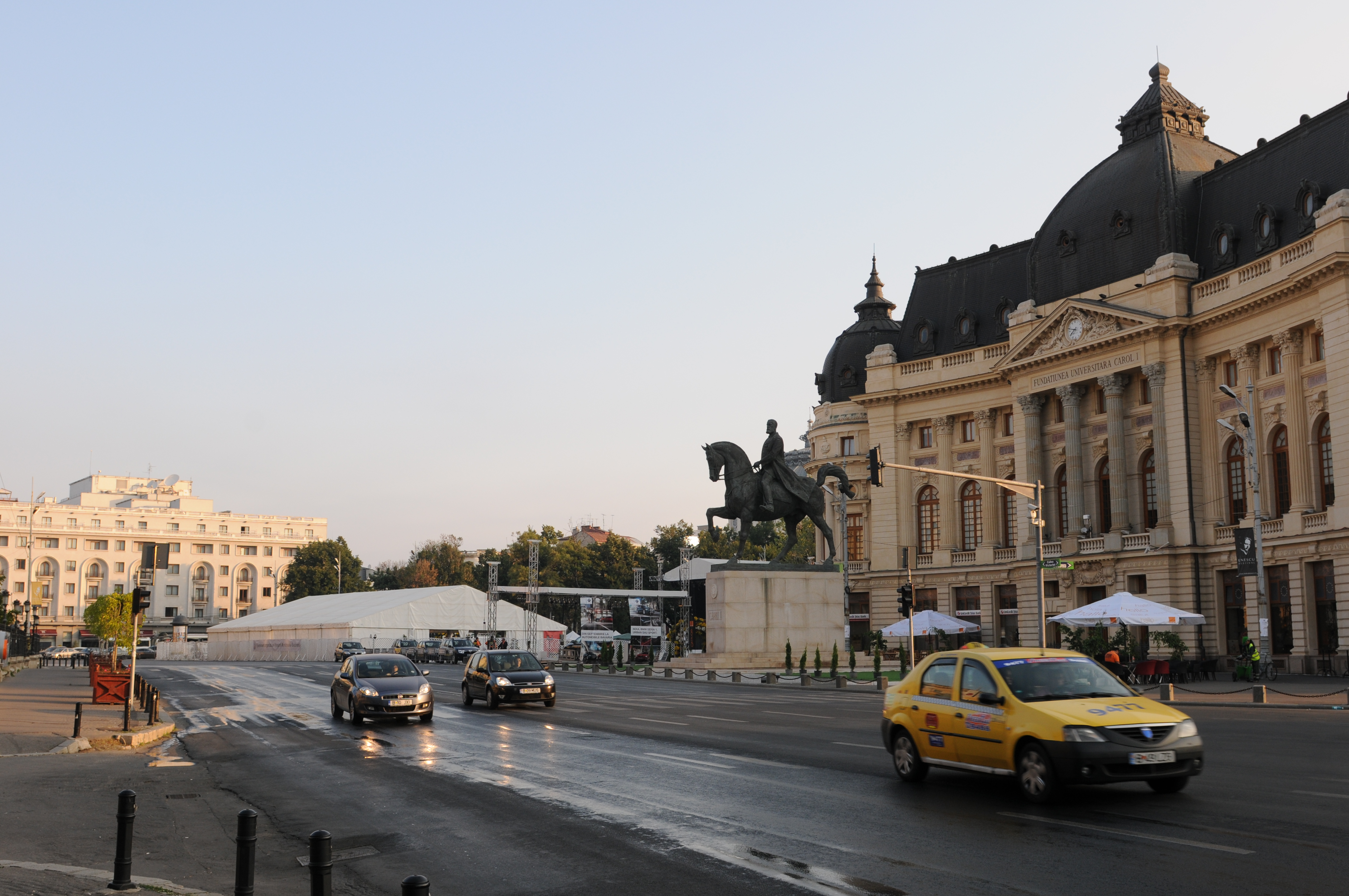 Calea Victoriei, Bucuresti